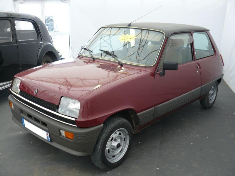 Mantes la Jolie 2012